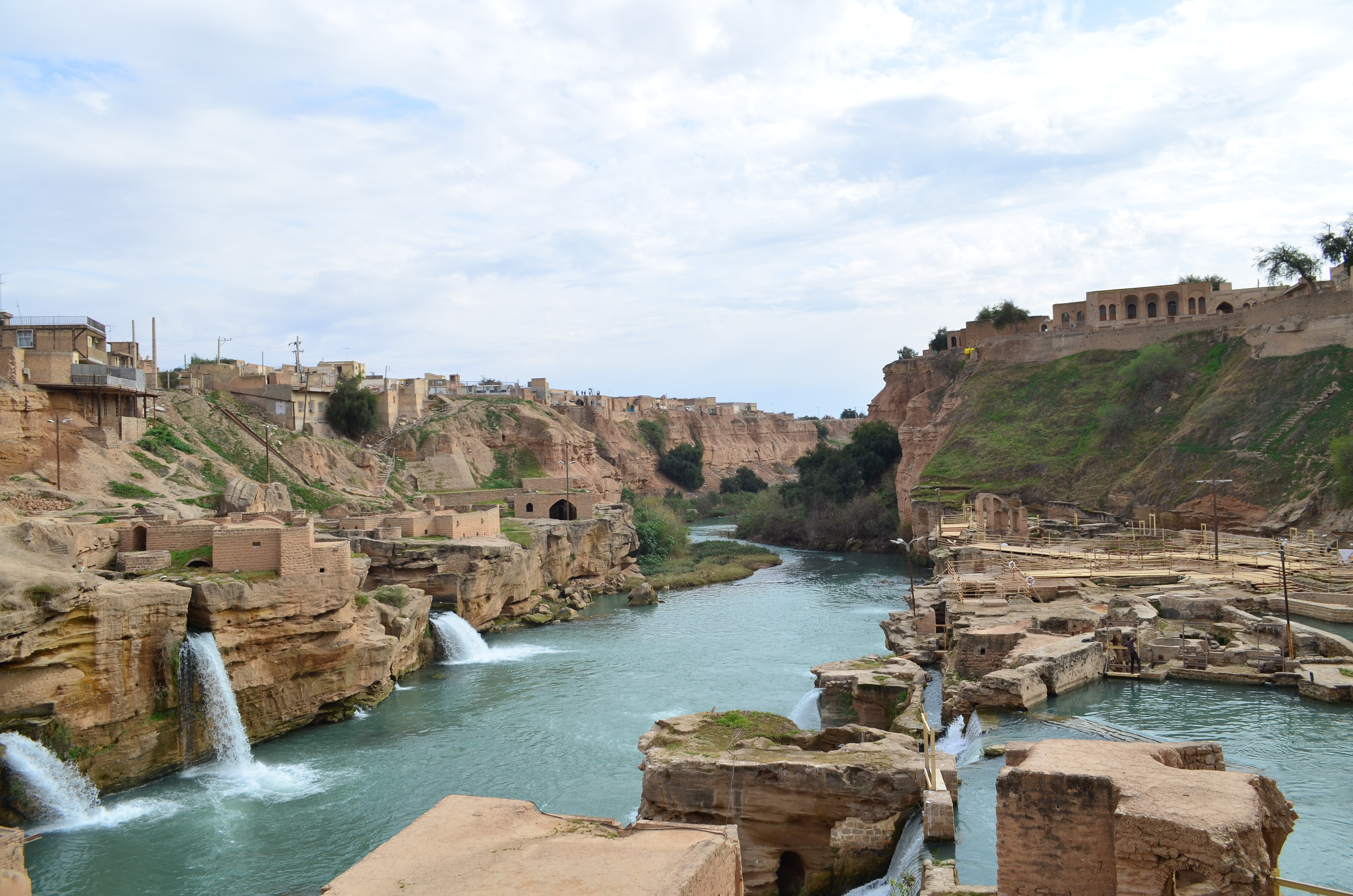 مجموعه آبشارها و آسیاب‌های آبی در سازه‌های آبی شوشتر